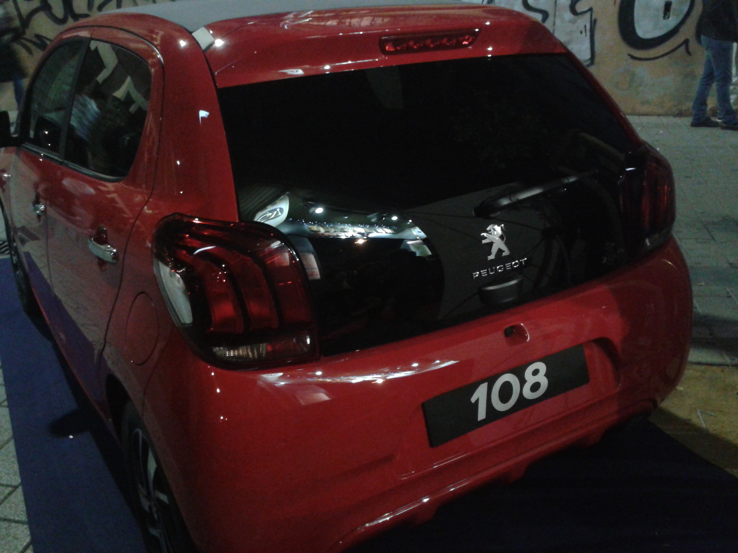 Peugeot 108 (2014)